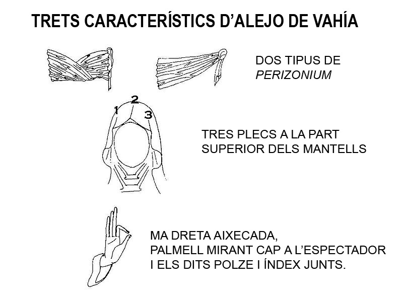 Característiques pròpies de l'escultor gòtic Alejo de Vahía